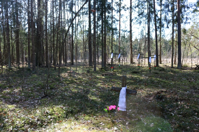 Przesieka (powieściowa Smolarnia), stan obecny. Groby są jedynymi zachowanymi śladami po nieistniejącej już wsi. Fot. Alena Liaszkiewicz (2019)